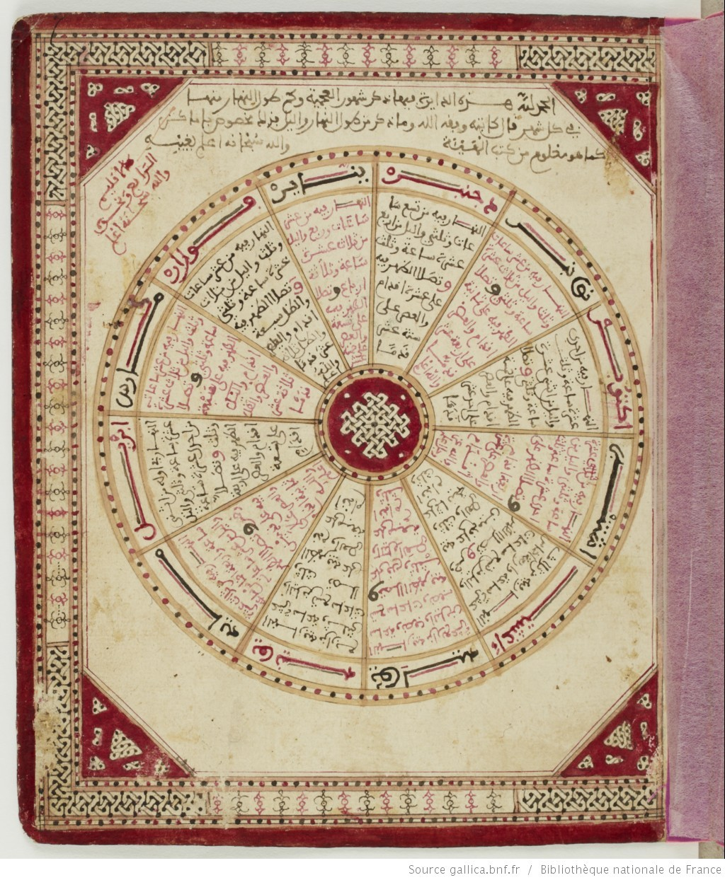 كتاب الطبلة